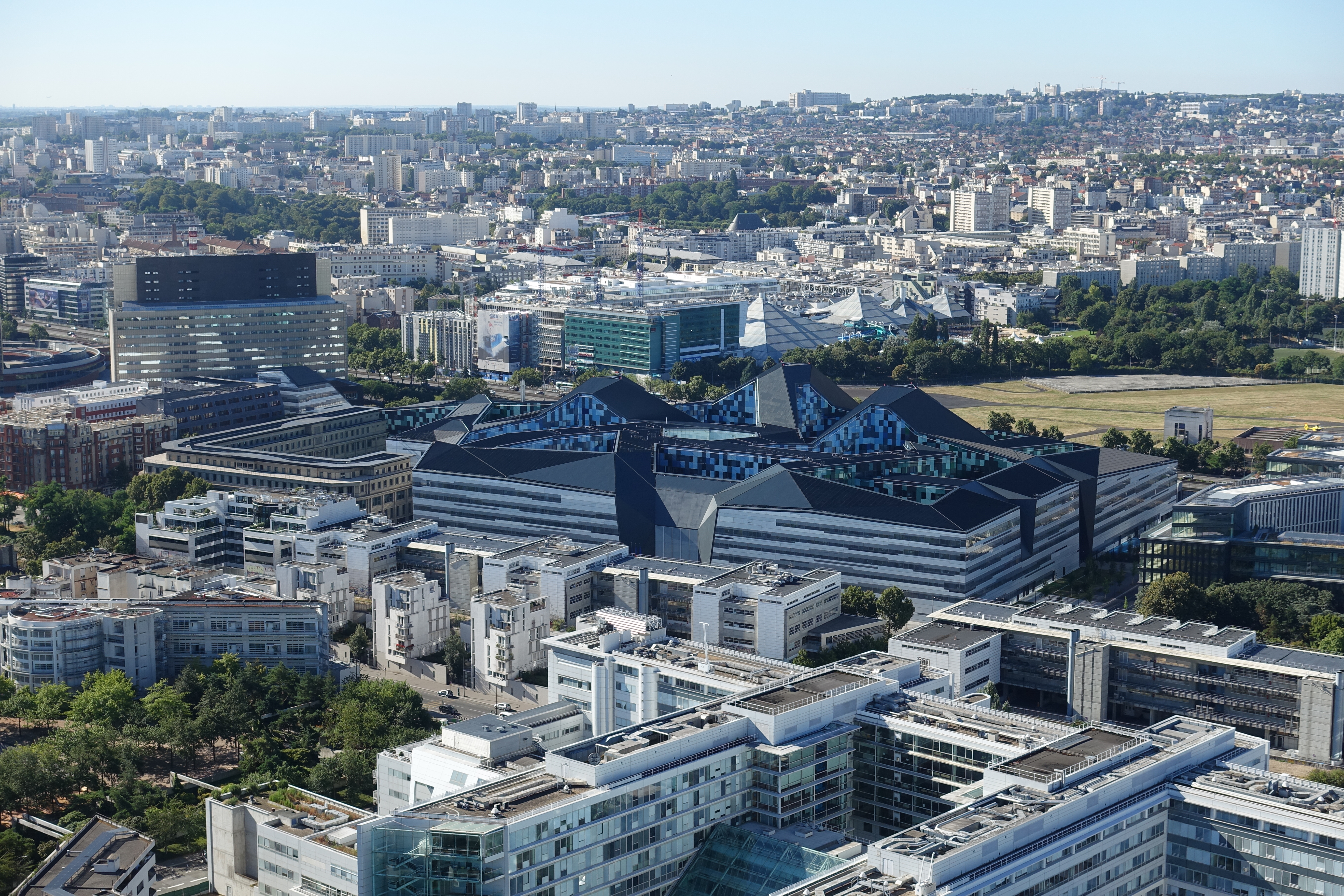 Hexagone Balard @ Ballon de Paris @ Parc André Citroën @ Paris